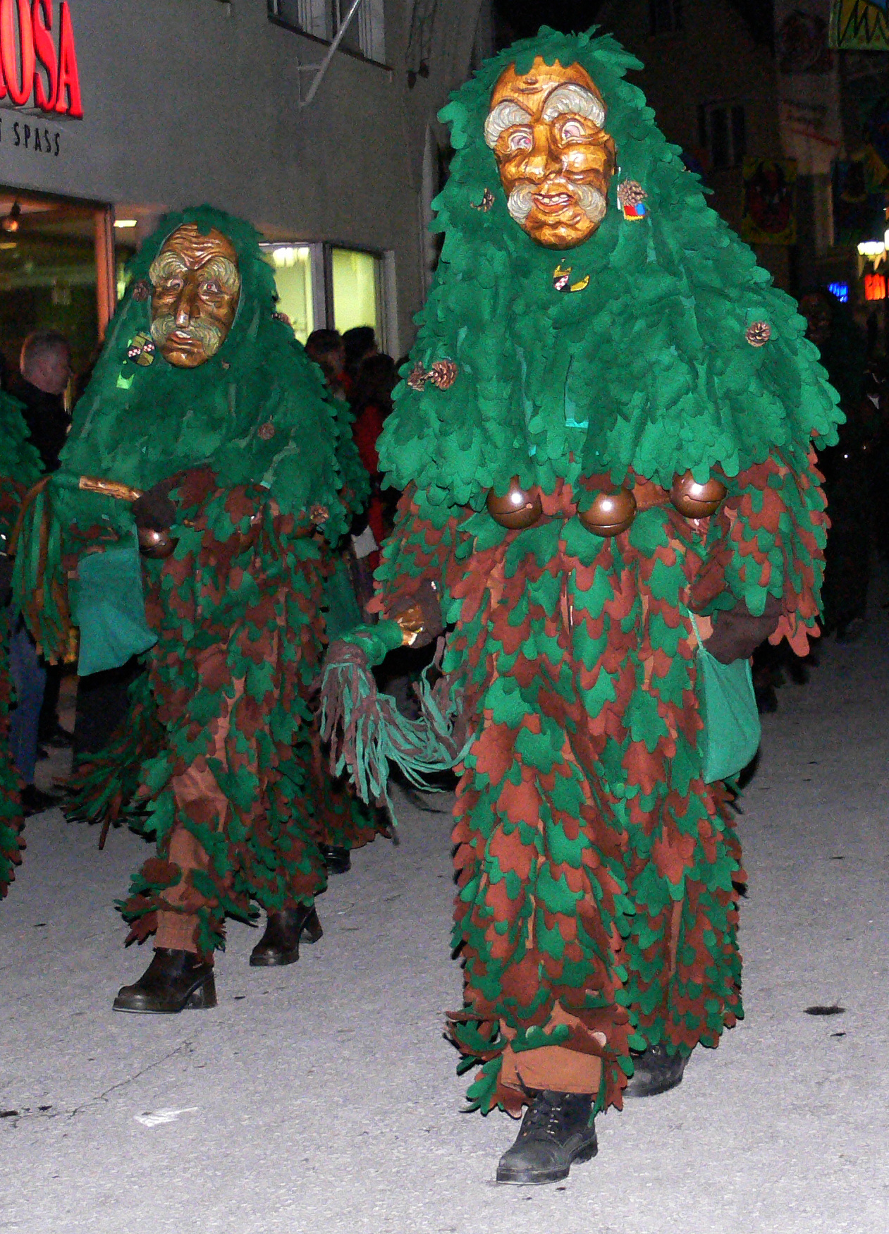 Narrenzunft Raspler Baindt, Narrenfigur: Waldschrat Veranstaltung: VSAN-Landschaftstreffen 2006 in Weingarten, Flecklesumzug